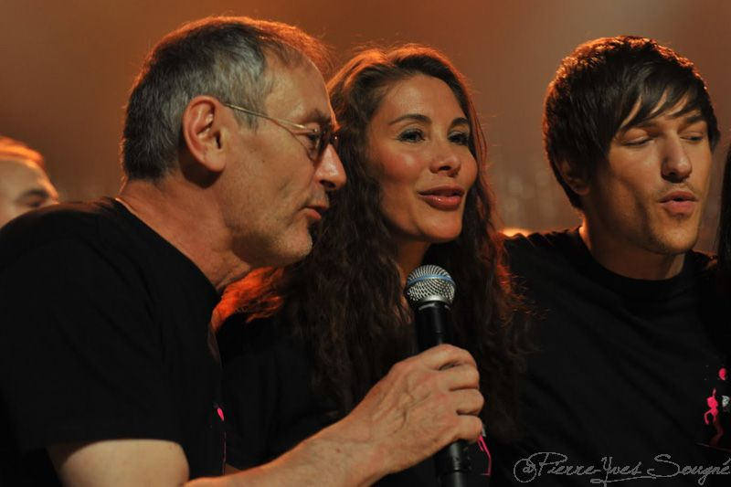 Resto du Coeur Belgique - Virginie Visconti ; Quentin Mosimann ; Michael Jones